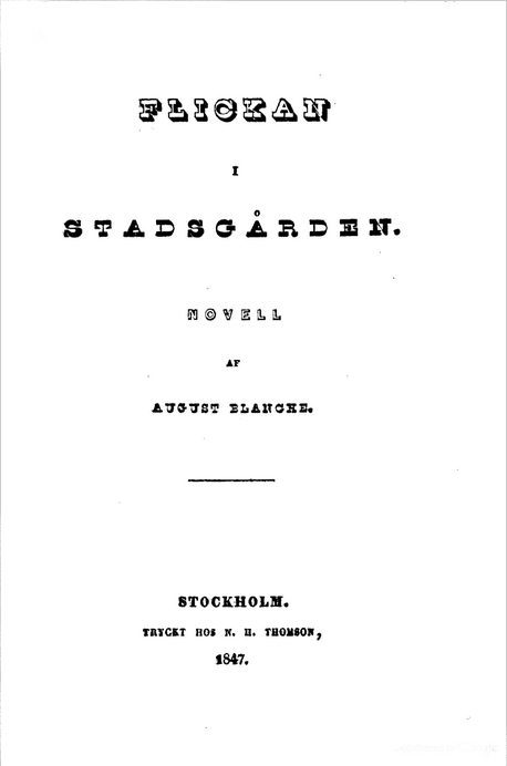 Försättsbladet till originalupplagan av Flickan i stadsgården.